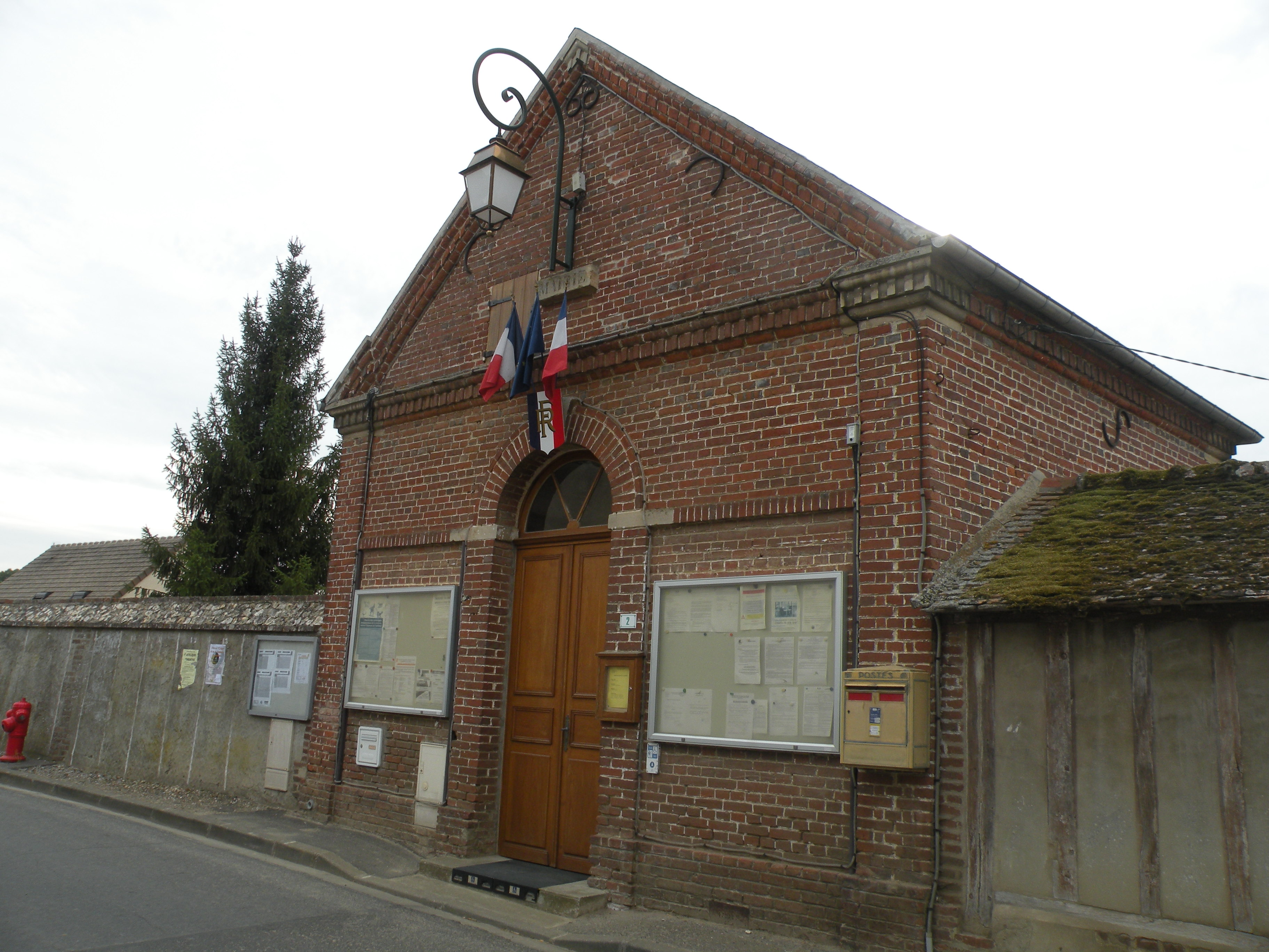 mairie Boissy-le-Bois